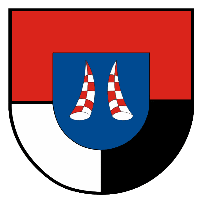 Stadtwappen von Kodersdorf